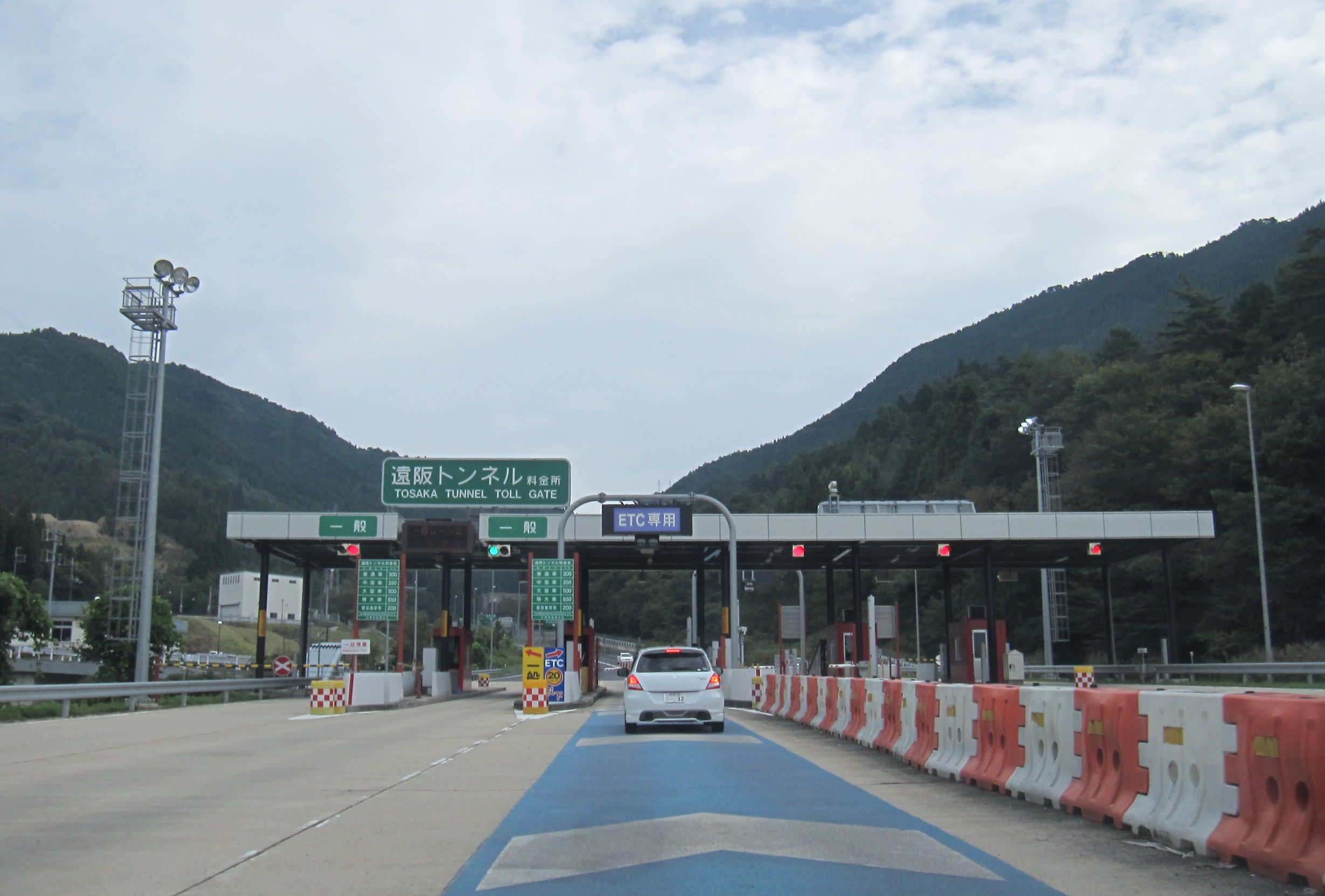 遠阪トンネル料金所